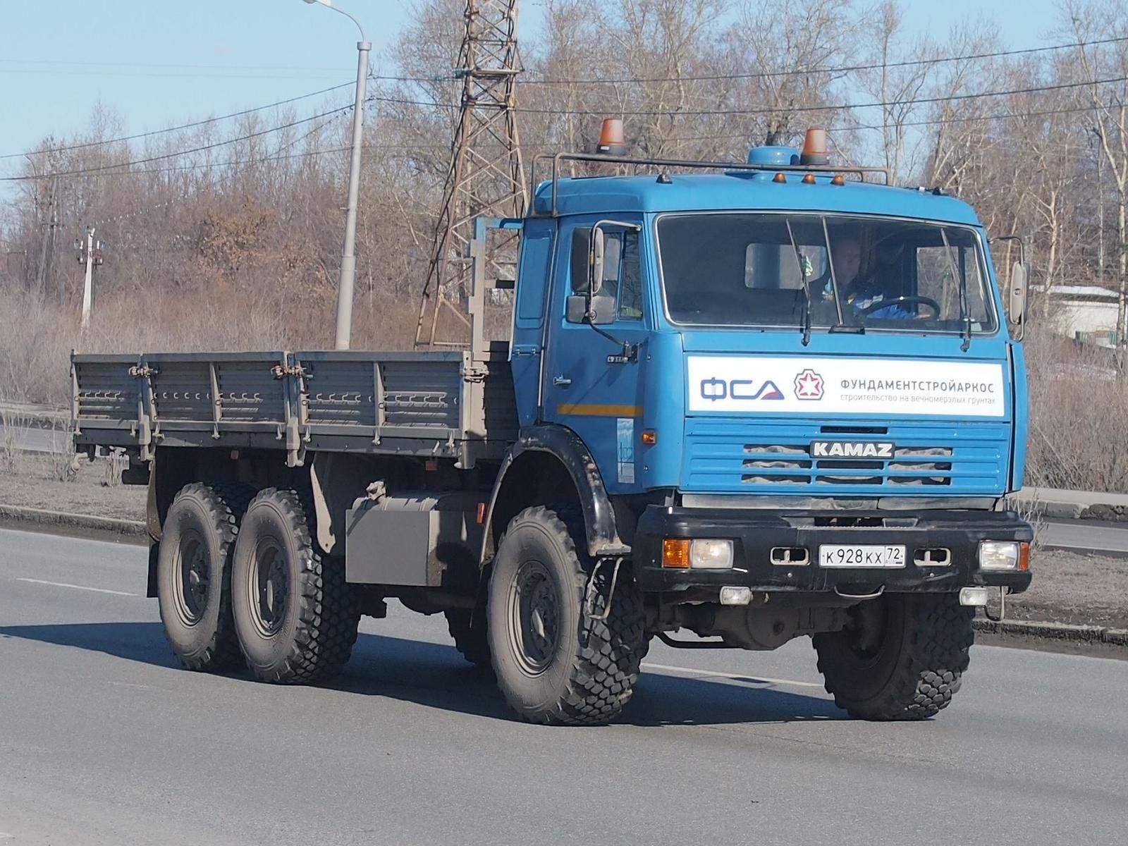 КАМАЗ-43118-10 Тюмень